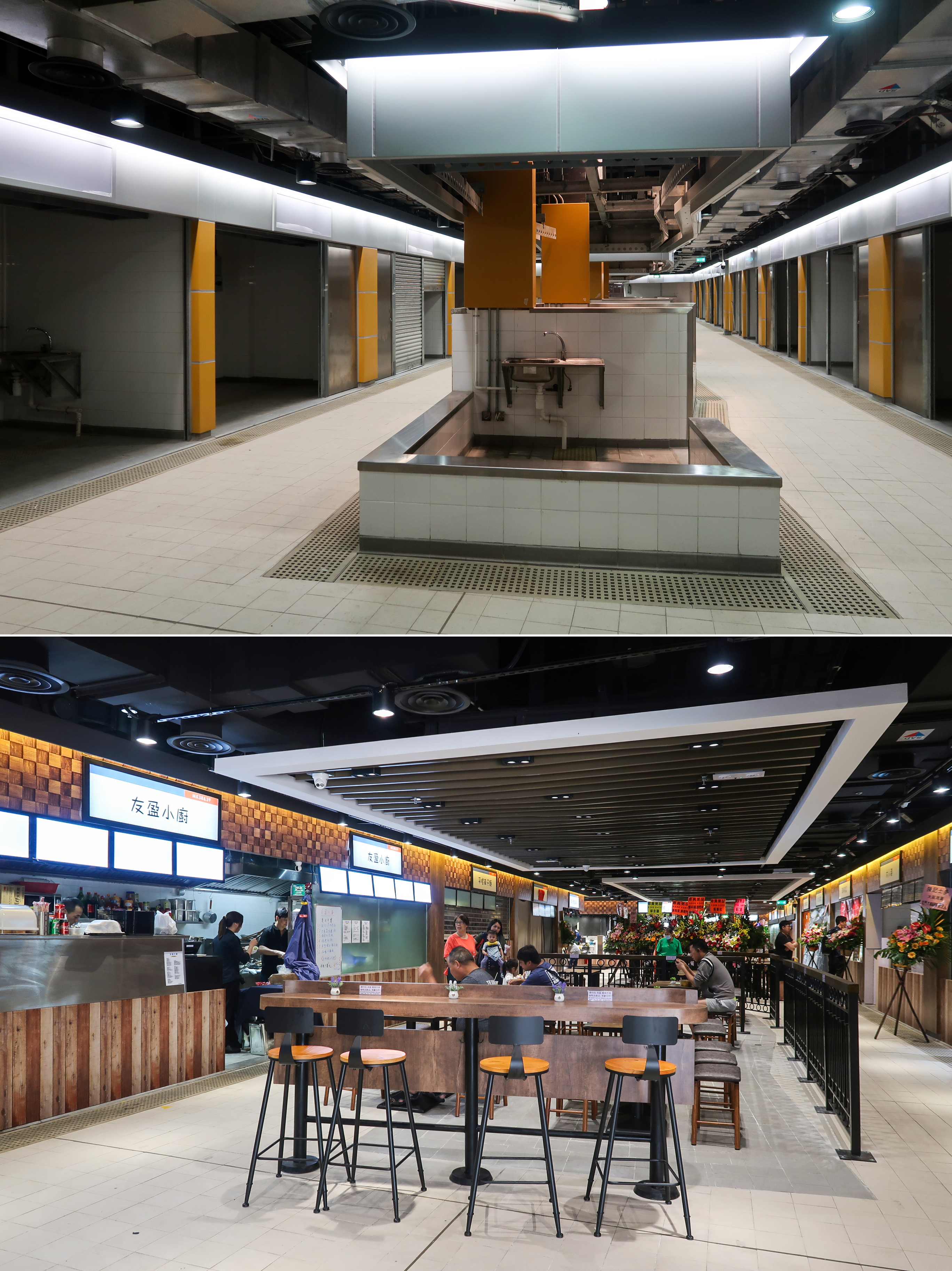 Ping Ha Road